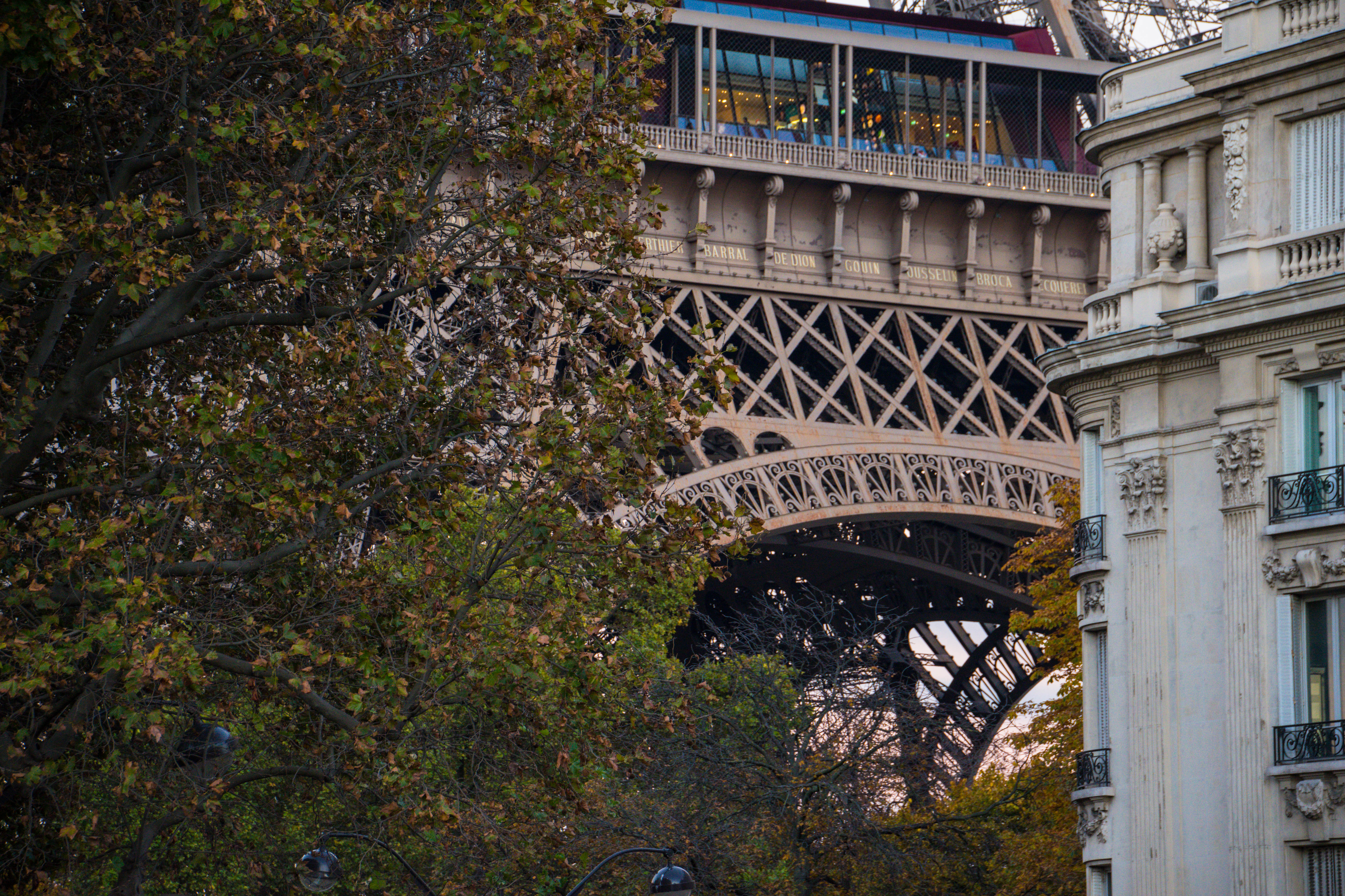 Premier étage de la Tour Eiffel, face sud-ouest prise de la promenade du Quai Branly, Paris, France.Noms de savants lisibles: BERTHIER - BARRAL - DE DION - GOÜIN - JOUSSELIN - BROCA - BECQUEREL